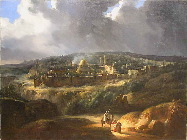 Auguste de FORBIN, Vue de Jérusalem, prise de la vallée de Josaphat, Salon de 1831.